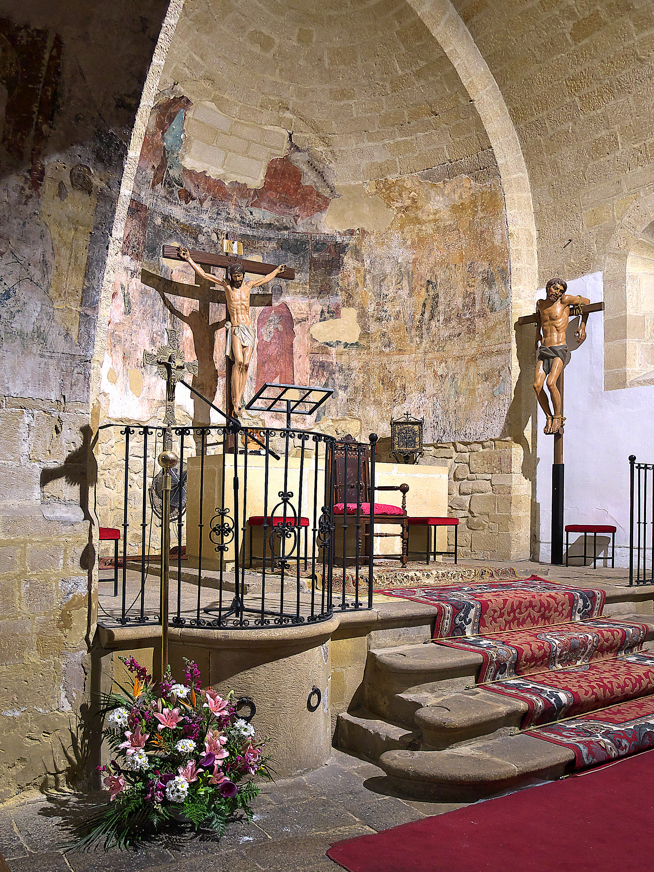 Presbiterio de la iglesia que conserva restos de primitivas pinturas.